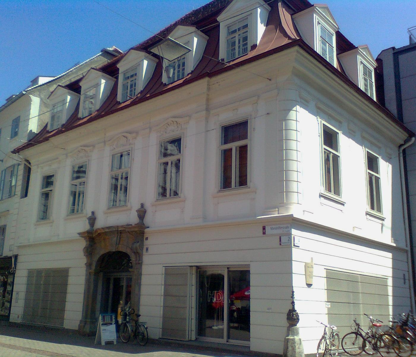 Palais Thinnfeld am Grazer Südtiroler Platz, hinter dem Grazer Kunsthaus